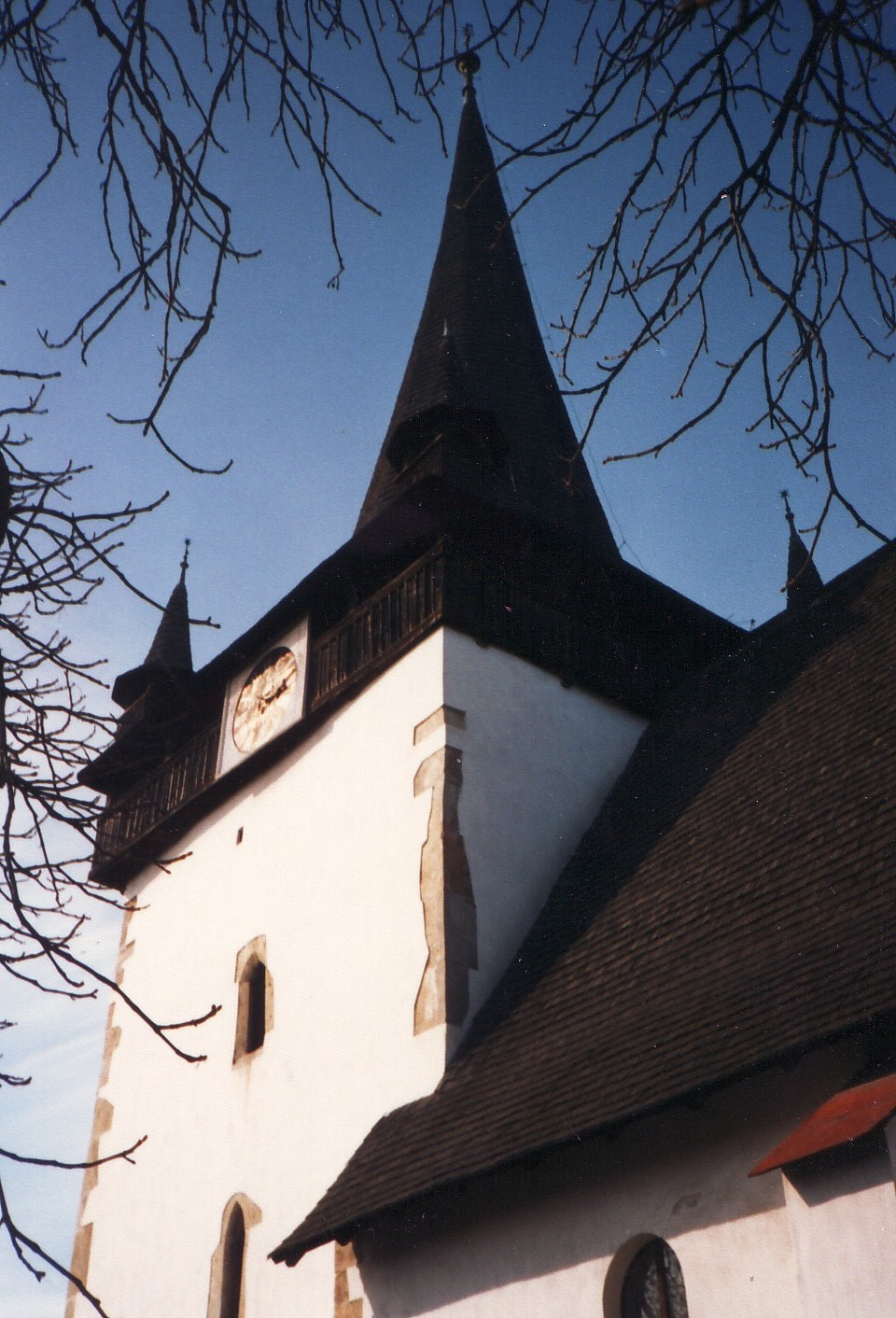 Bánffyhunyadi református templom